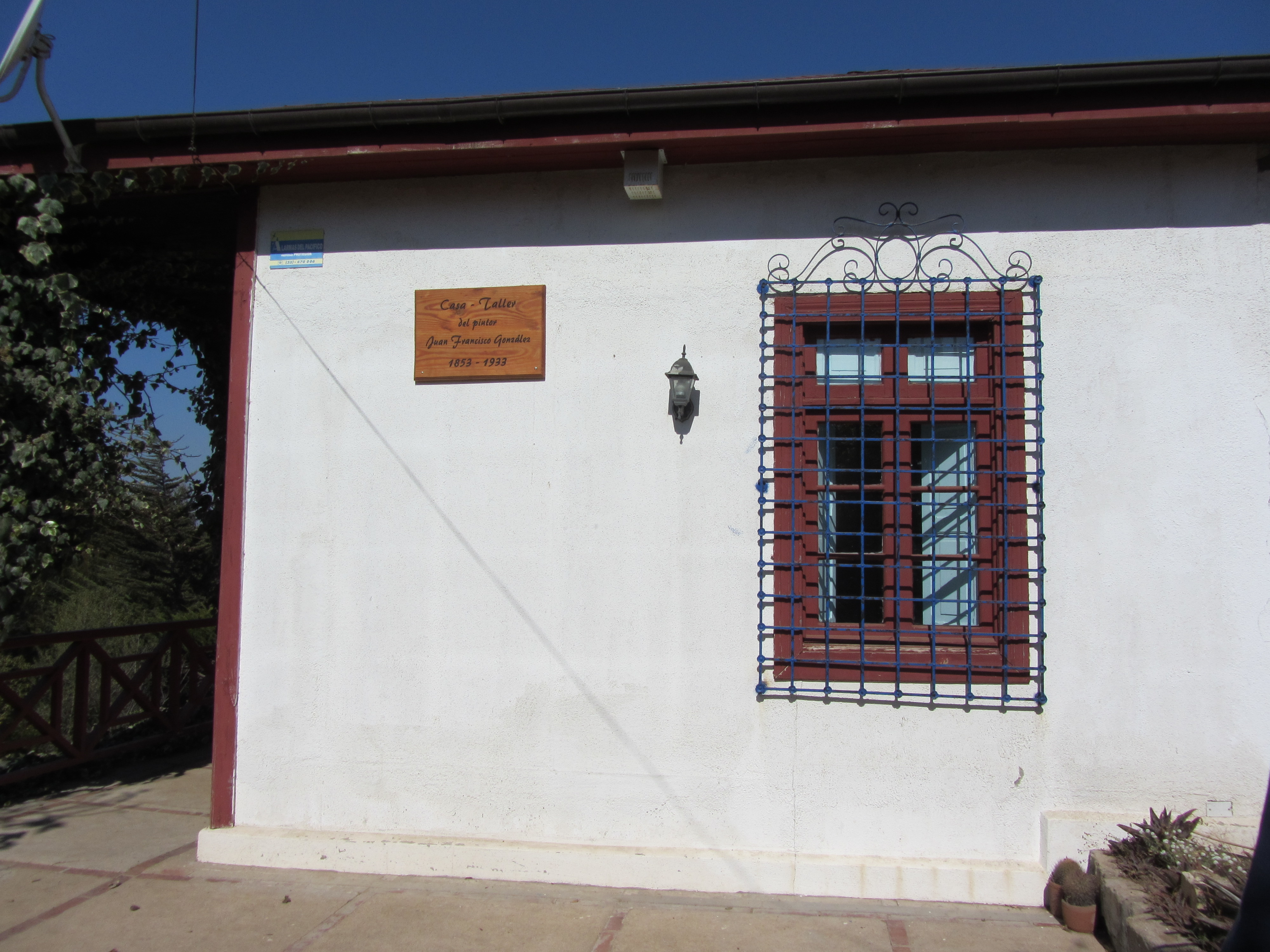 La que fuera casa-taller del pintor chileno Juan Francisco González en Las Cruces. Ahora la habita el escritor Eduardo Labarca